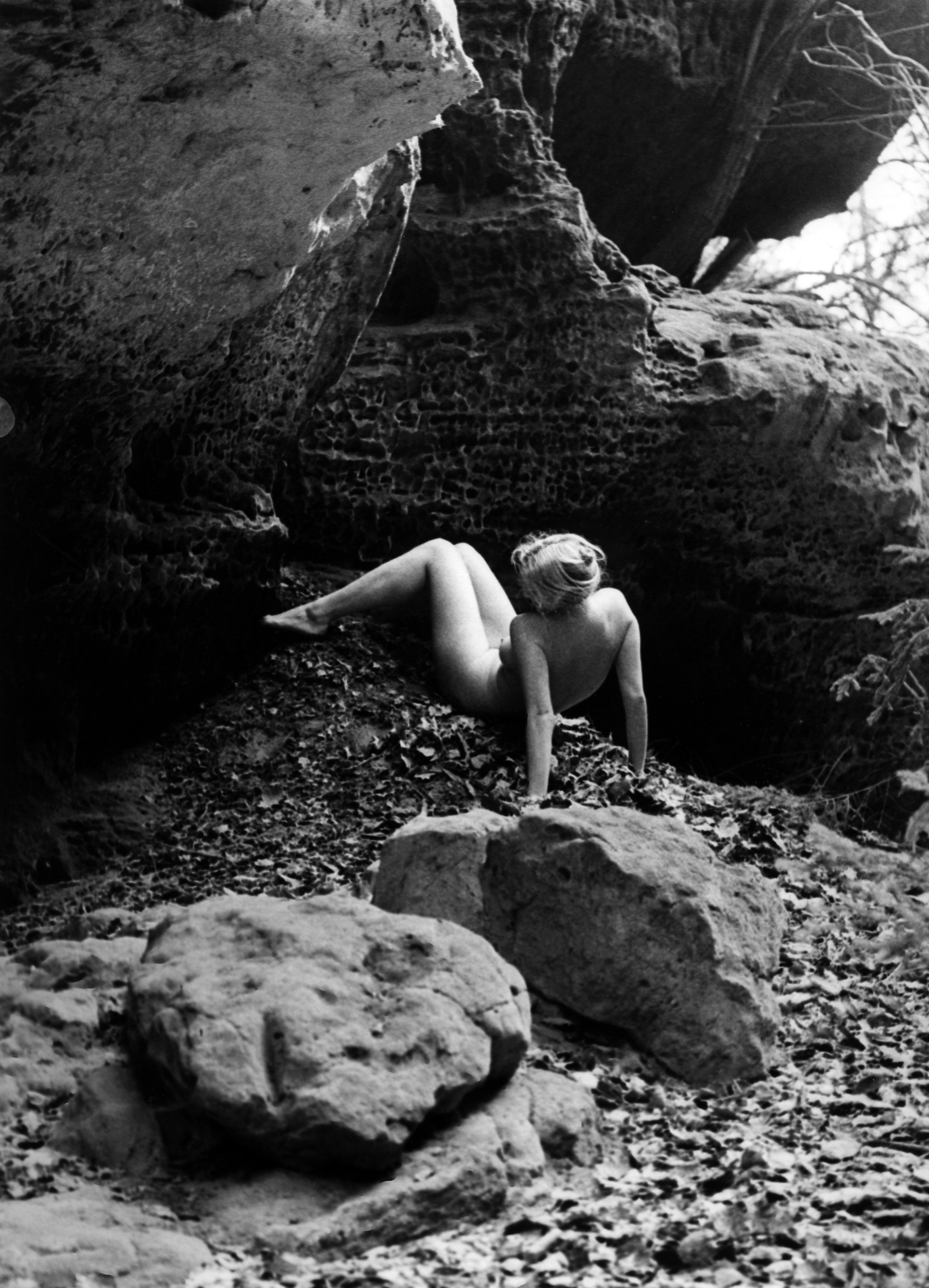 František Dostál - AKT